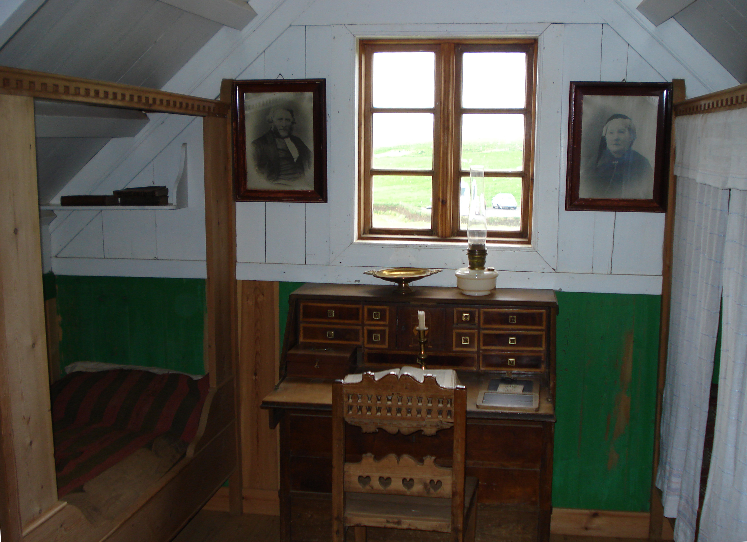 Sleeping room in Glaumbaer, Iceland